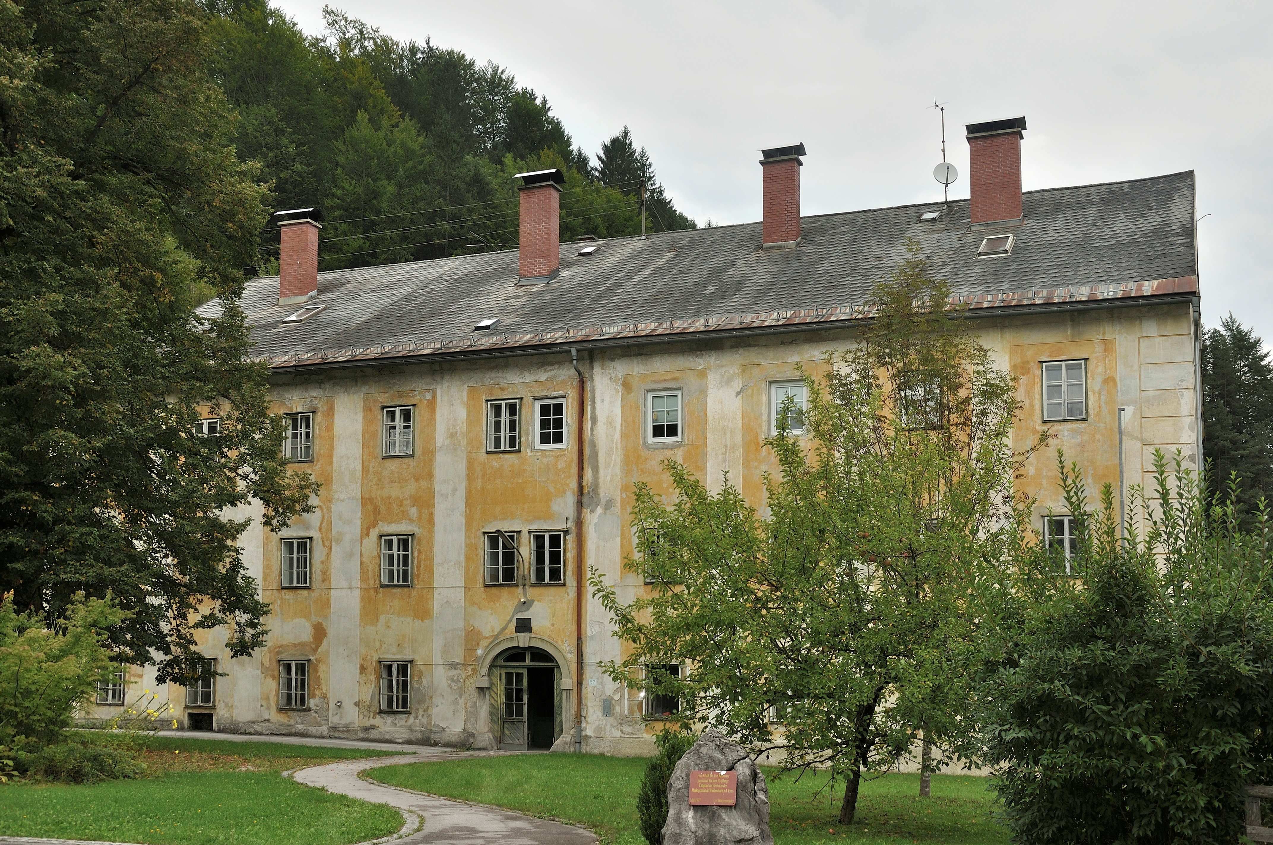 Ehem. Schüttkasten